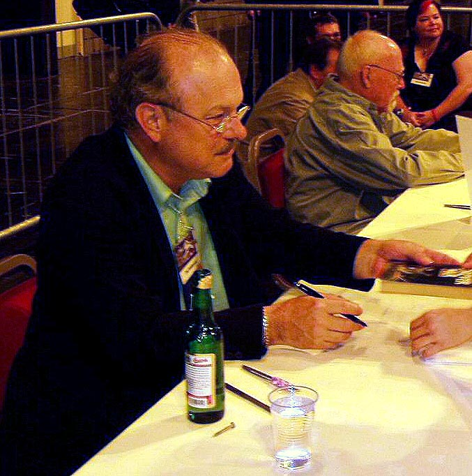 Joe Haldeman.